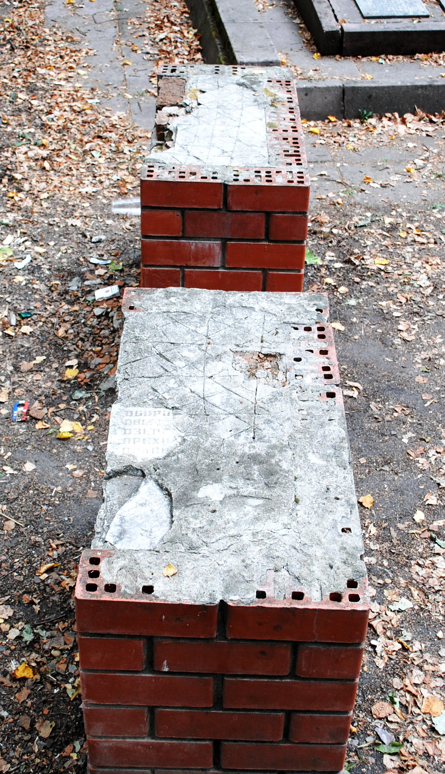 Липовчик